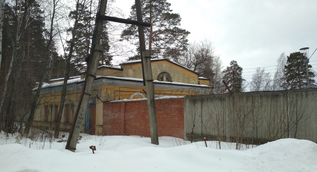 Дом офицеров в посёлке Акуля, Кыштымском городском округе.